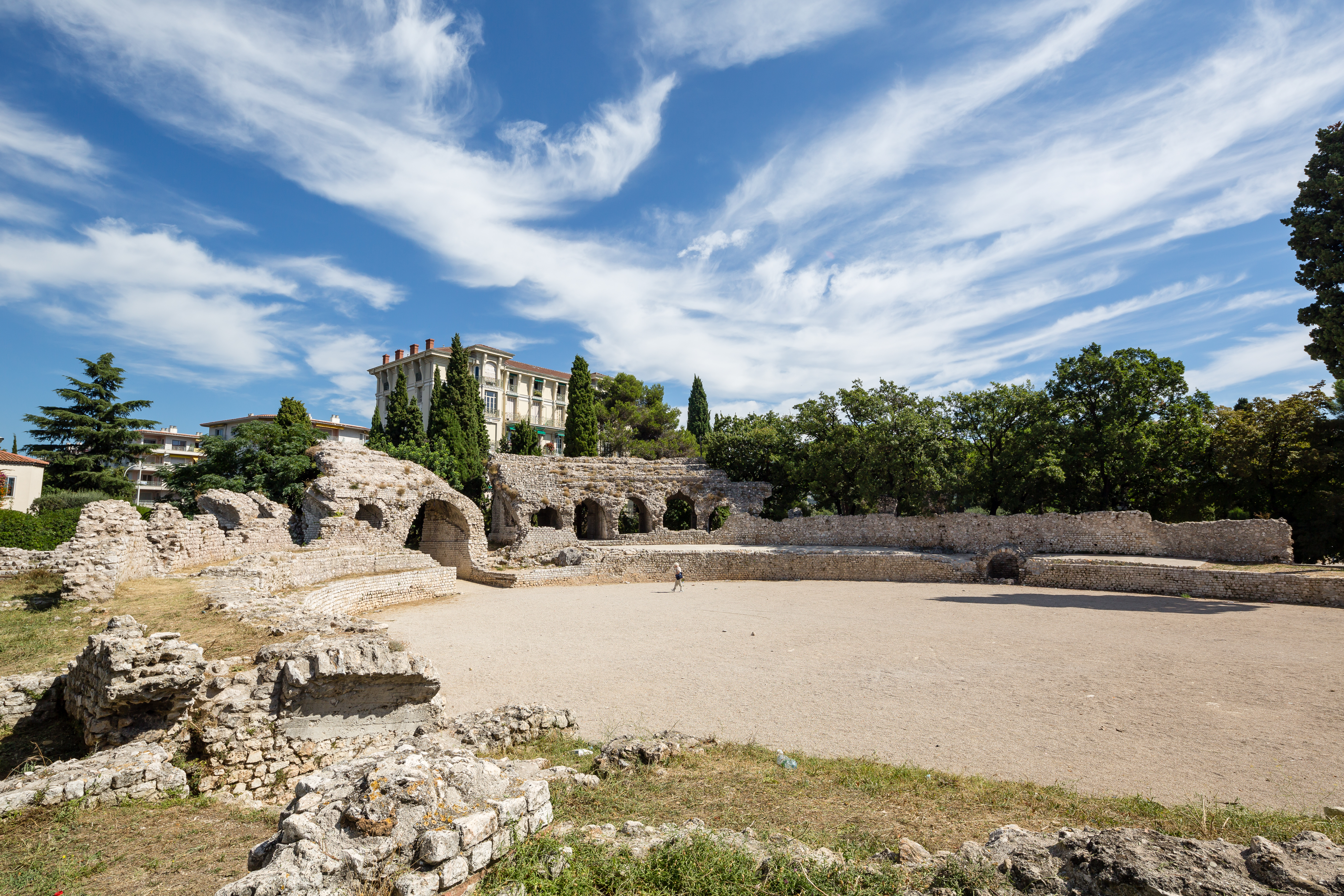 Les arènes de Cimiez à Nice (France).